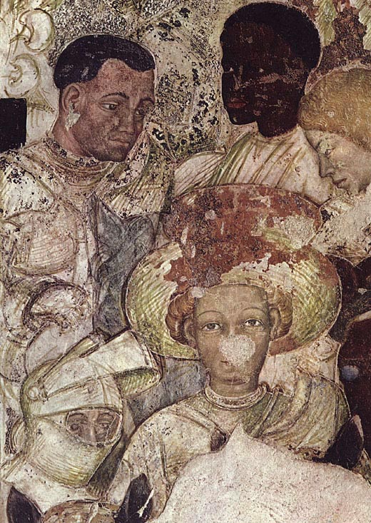 pisanello, Torneo-battaglia di Louverzep in the Palazzo Ducale, Mantua